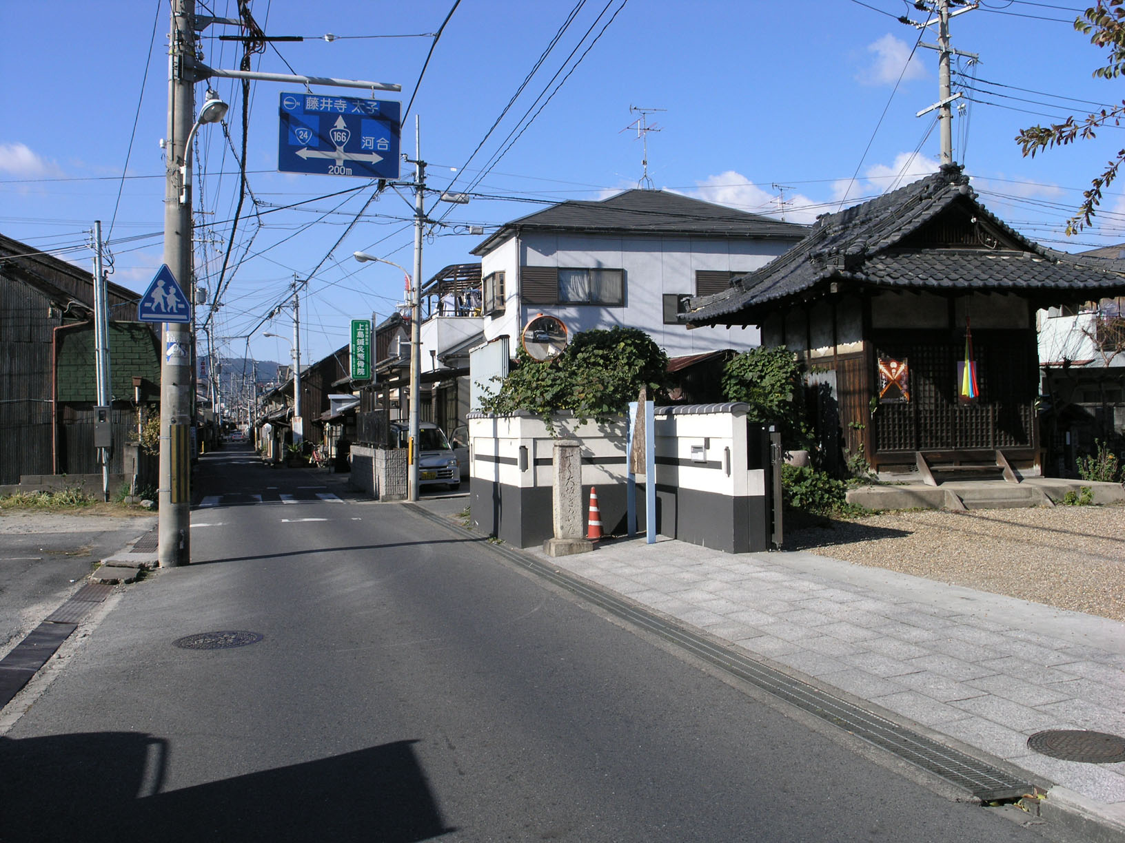 Yokooji, Ise-honkaido in Nara, Japan